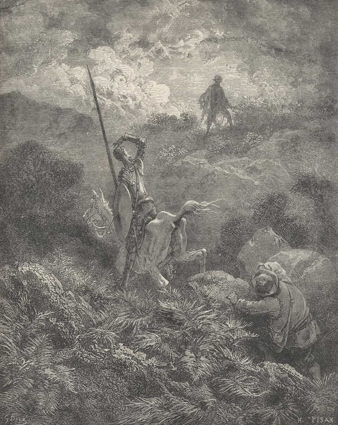 Dom Quixote vislumbra um indivíduo que se afasta